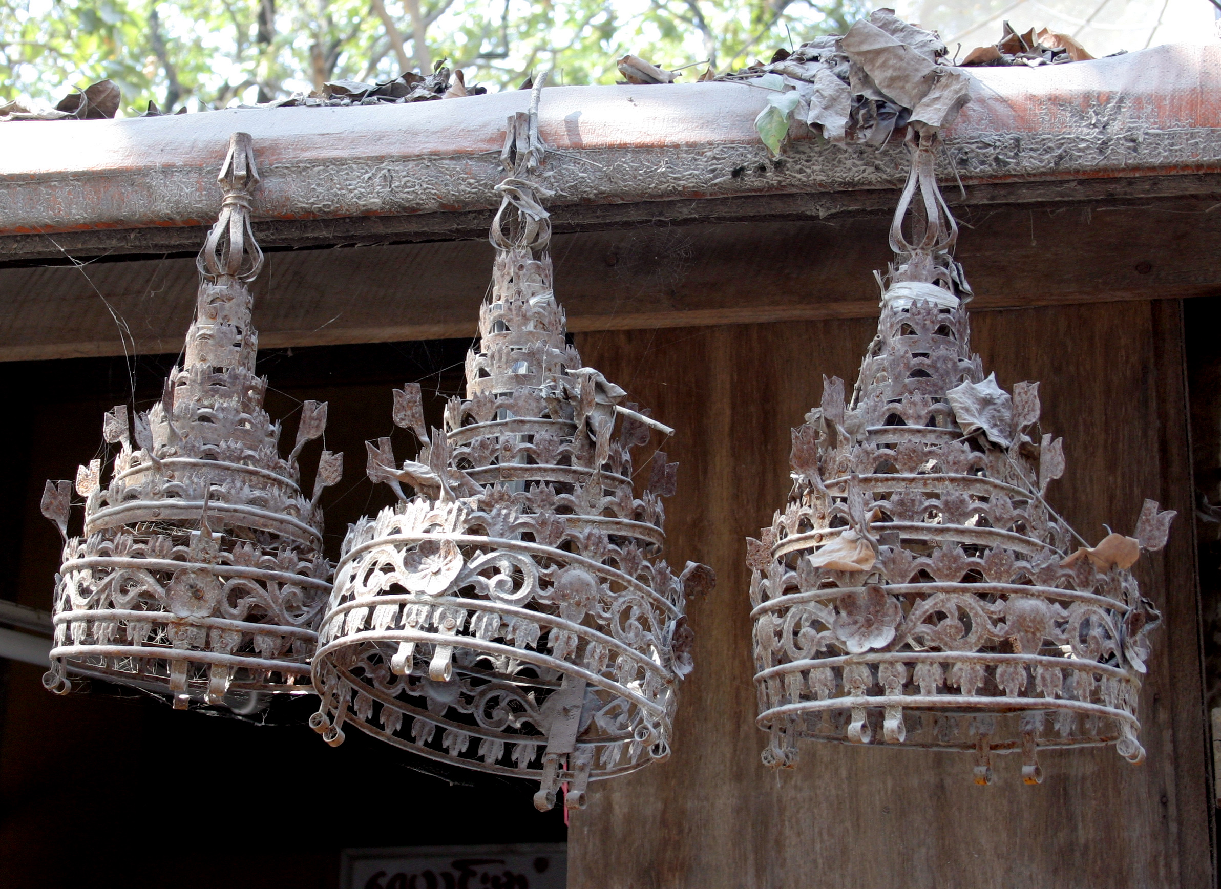 Htis. Schirme für Pagodenspitzen.